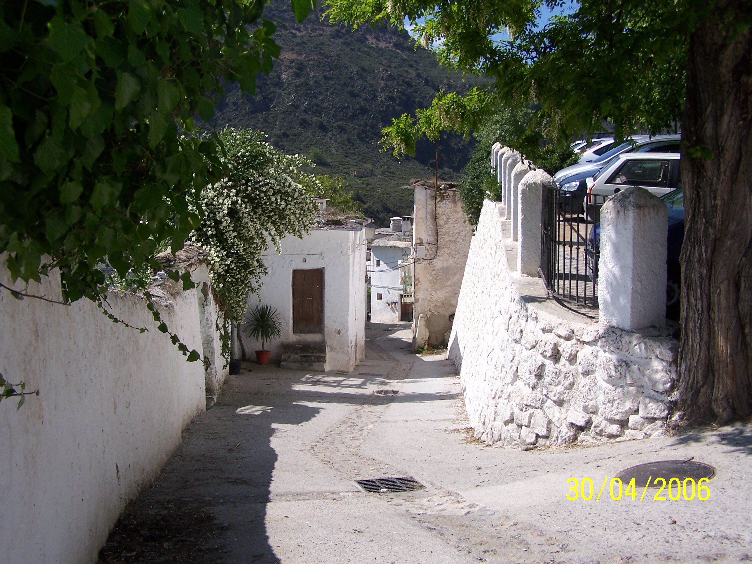 Plaza en Ferreirola, municipio de La Taha (Granada, España)